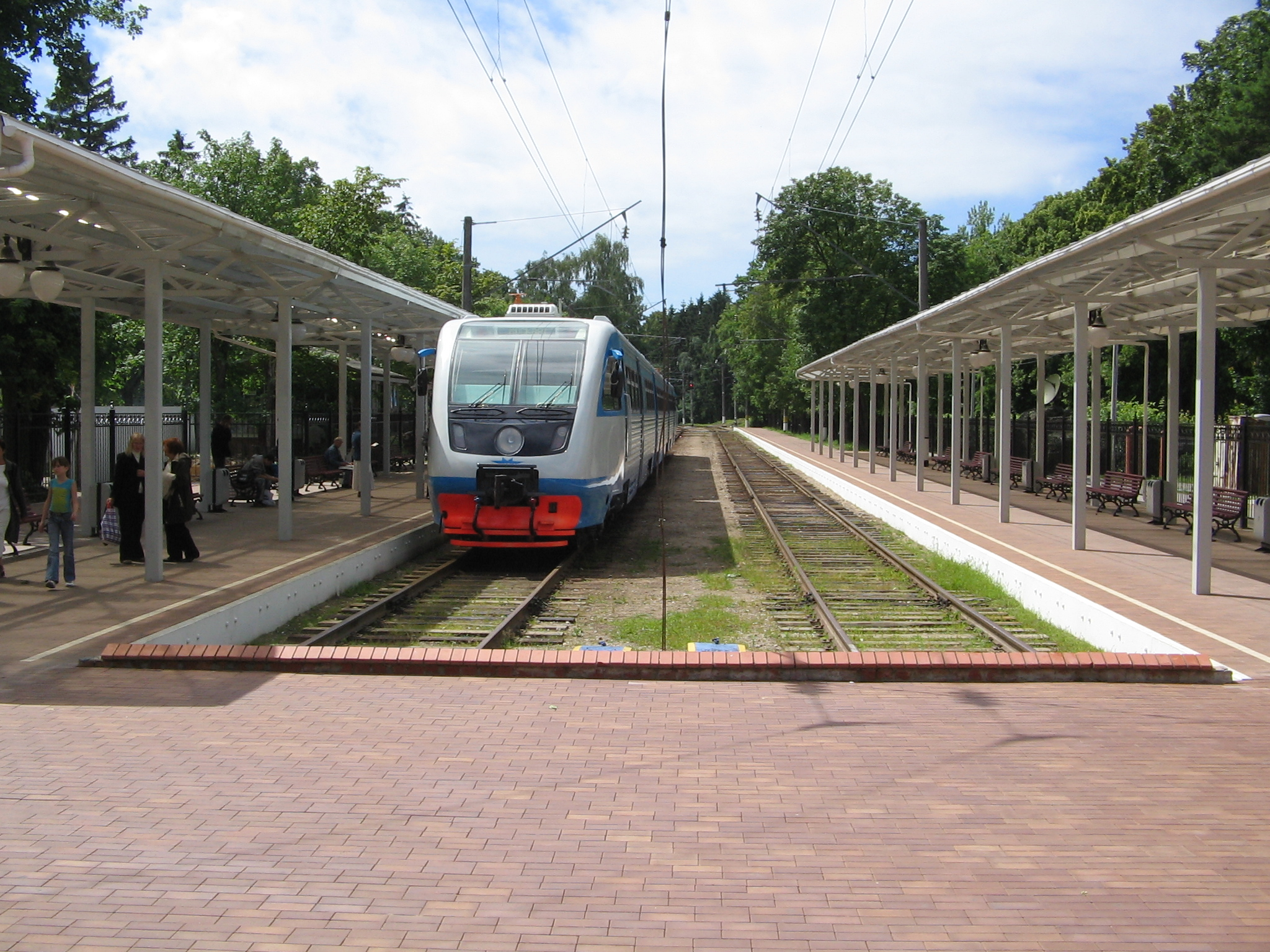 Собственная работа